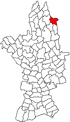 Categorie:Hărţi ale judeţului Olt